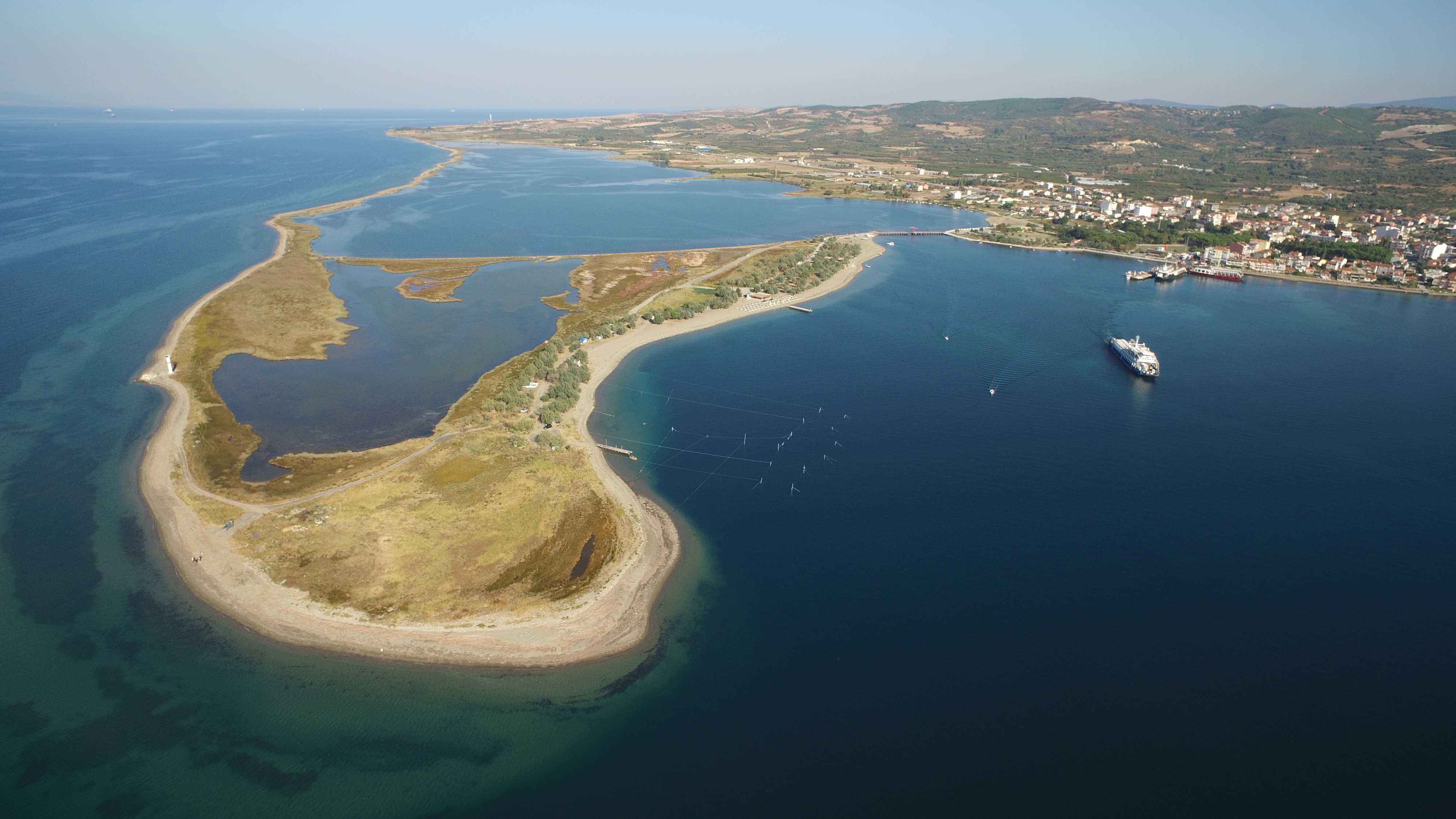 Çardak Kum Adası